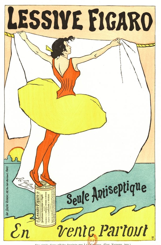 Fac similé Lithographic poster Lessive Figaro designed by Léo Gausson, imprimerie Verneau (Paris).